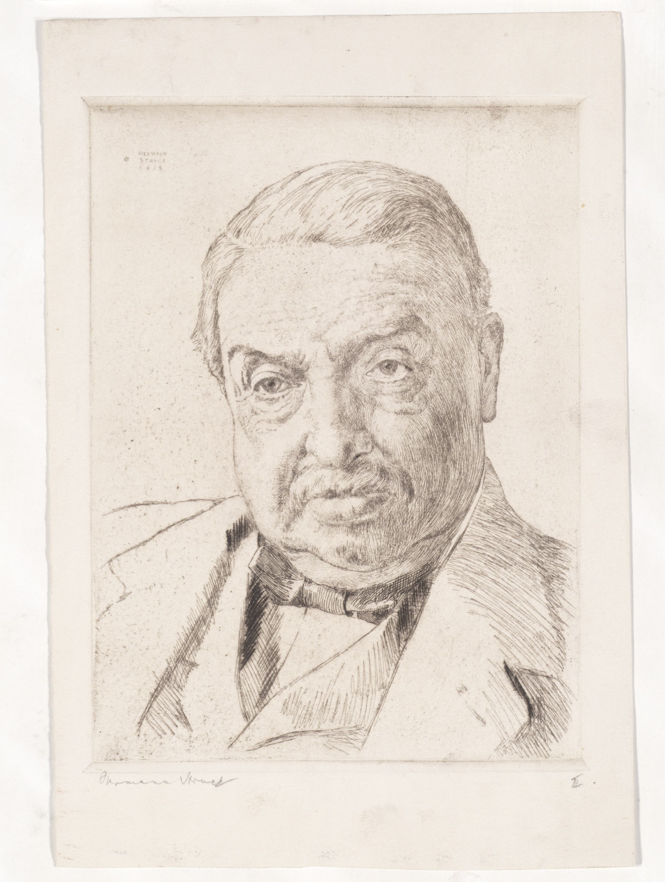 Artwork by Hermann Struck Dargestellte Person: Wallich, Hermann (1833 - 1928), DNB-Link Datierung Display: 1913 Objektart: Radierung Schlagworte Inhalt /Geografie: Mann, Porträt, alter Mensch, Kleidung Schlagworte Kontext: Bankier